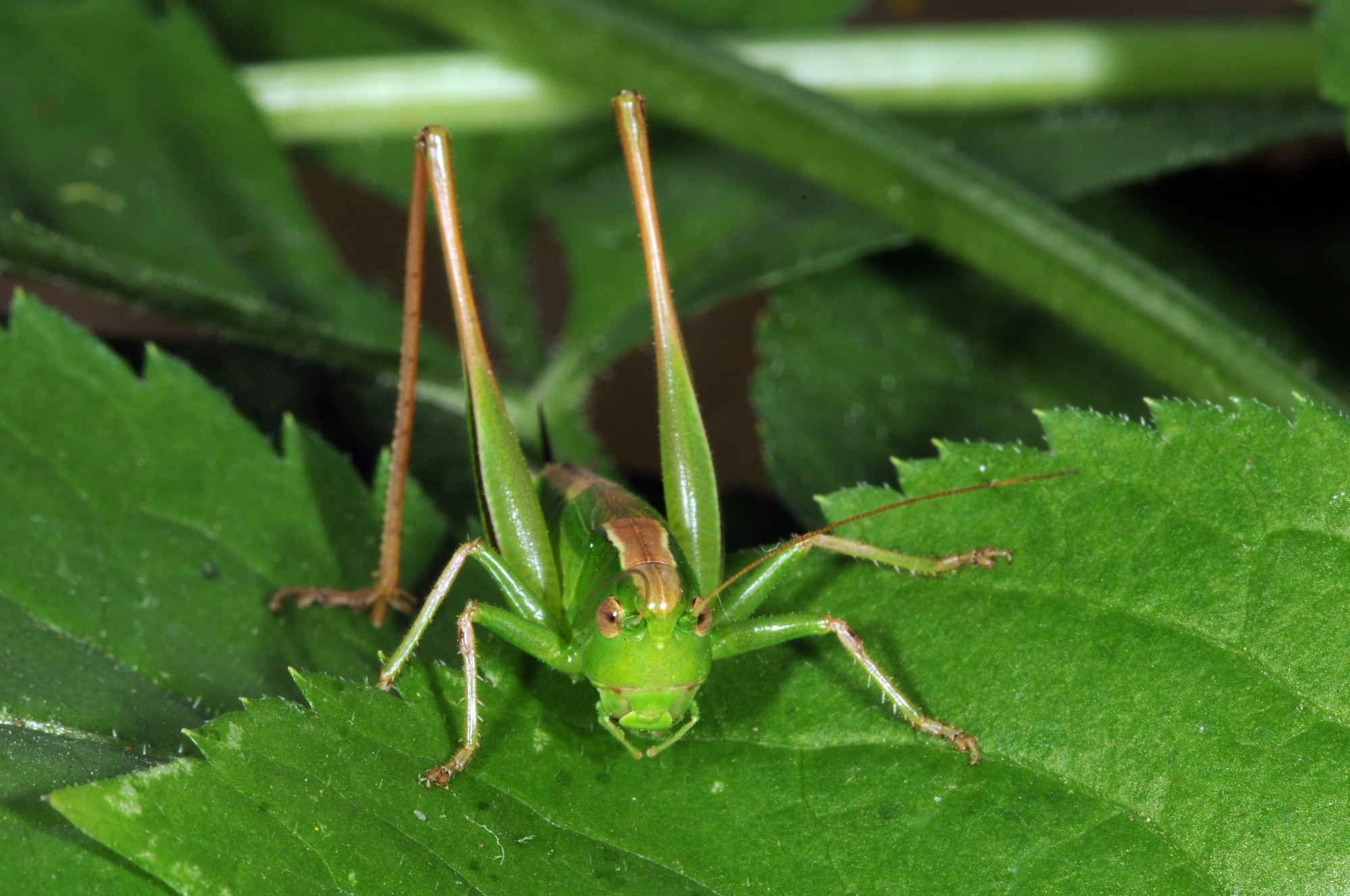 Metrioptera bicolor, Weibchen, Mainzer Sand, Rheinland-Pfalz, Deutschland